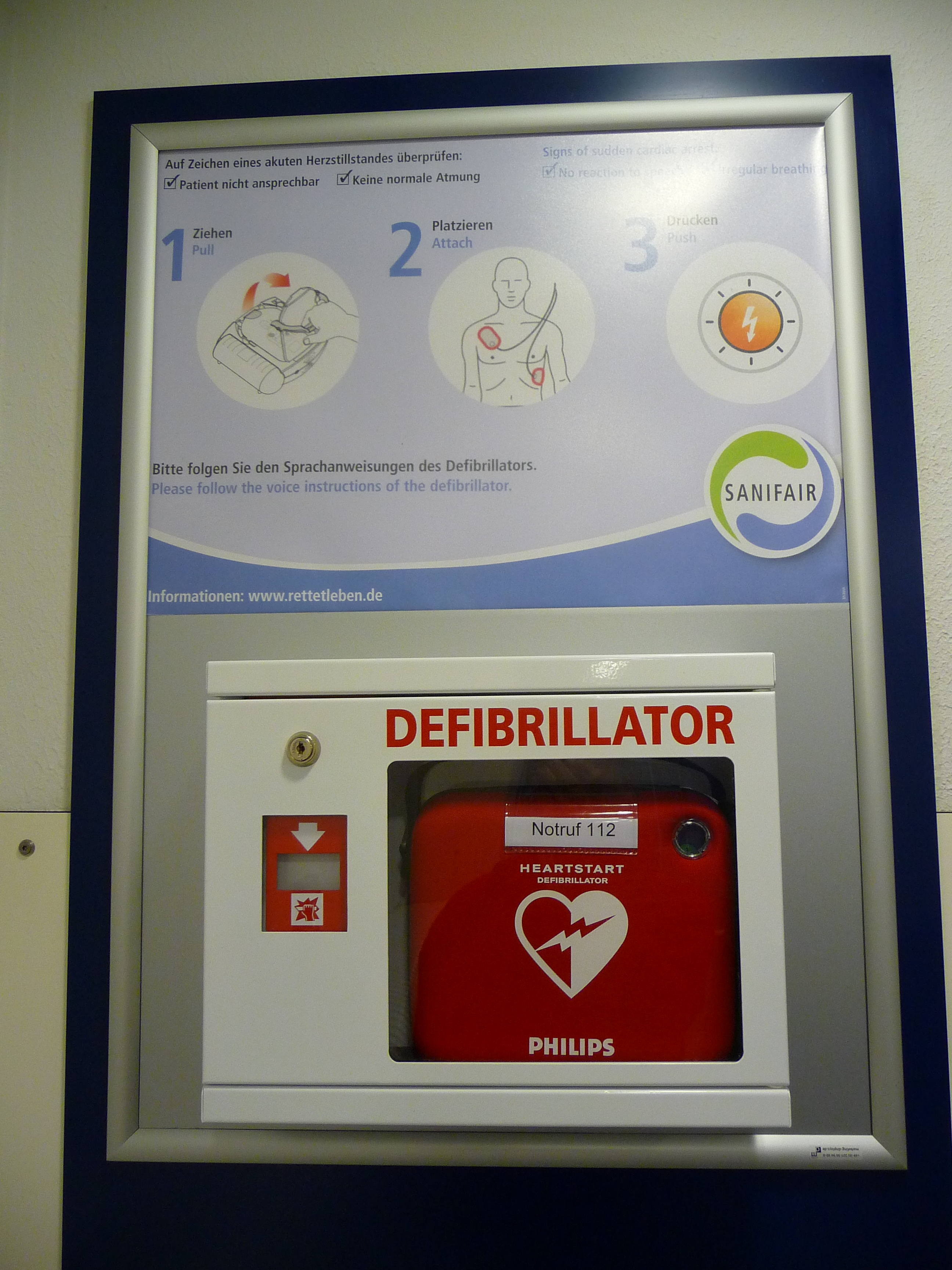 Defibrillator in einem von der Firma Sanifair geführten Sanitärbereich einer Autobahnraststätte in Nordrhein-Westfalen (Deutschland)